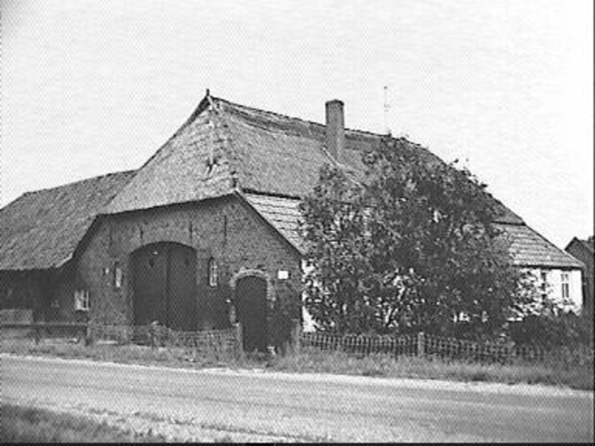 Graafschap Zutphen/ Boerderijen: achter- en zijgevel (opmerking: Deze afbeelding hebben wij helaas alleen in deze lage resolutie.)